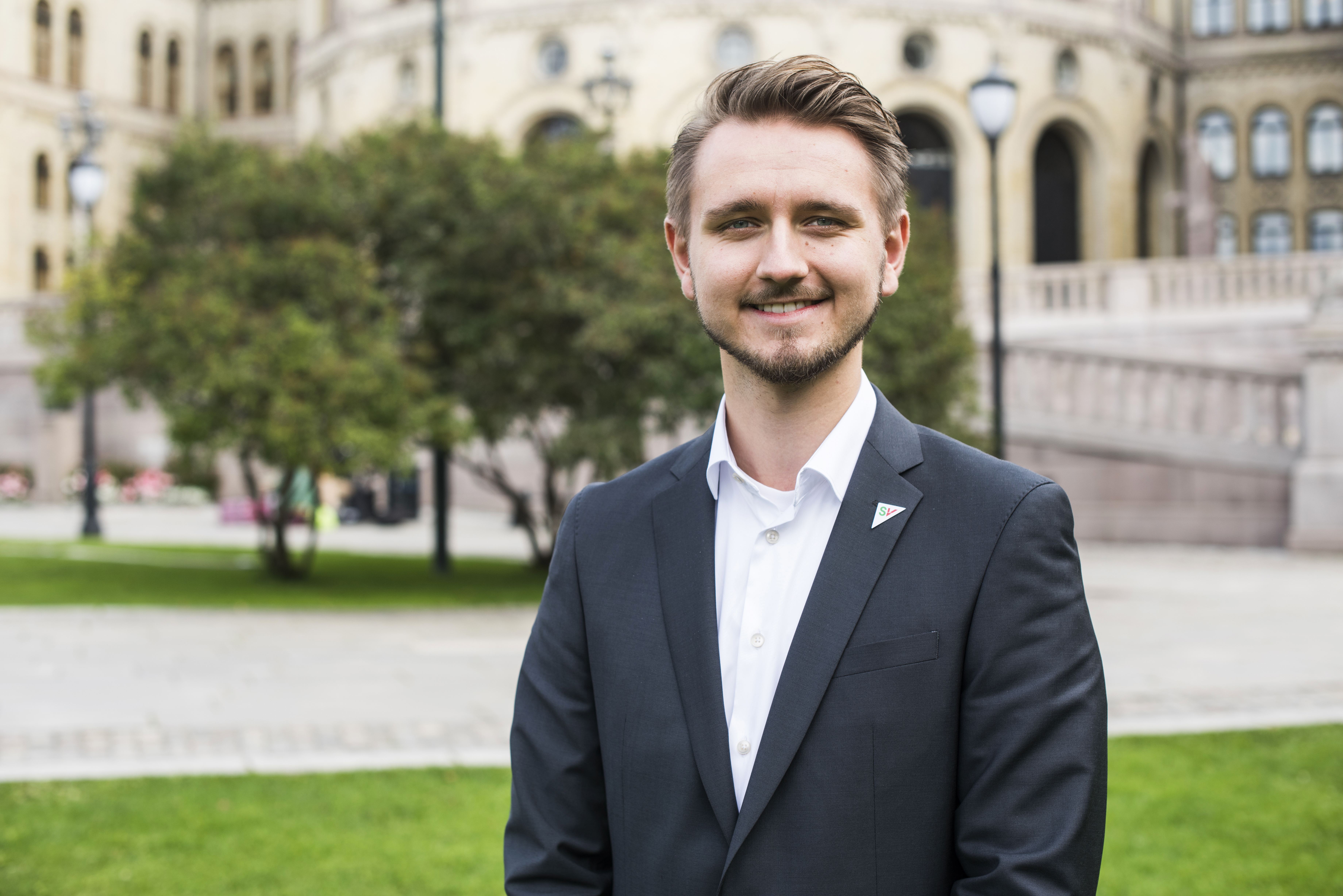 Freddy Andre Øvstegård